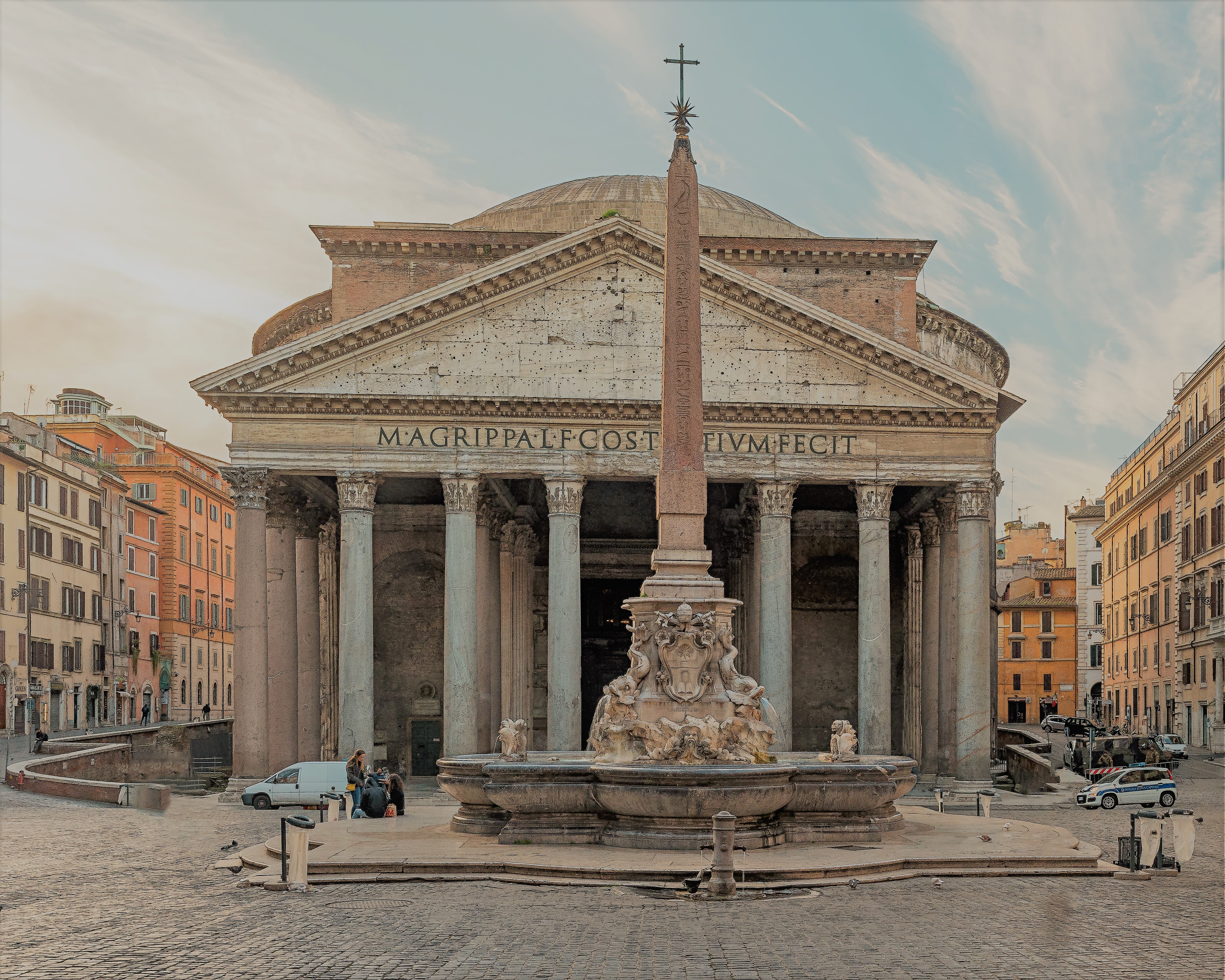 Das Pantheon in Rom. Im Vordergrund steht der ägyptische Obelisco Macuteo